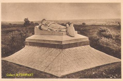 monument au sous lieutenant Thome (Andre Thomé) du 6e Dragons, tué à Verdun